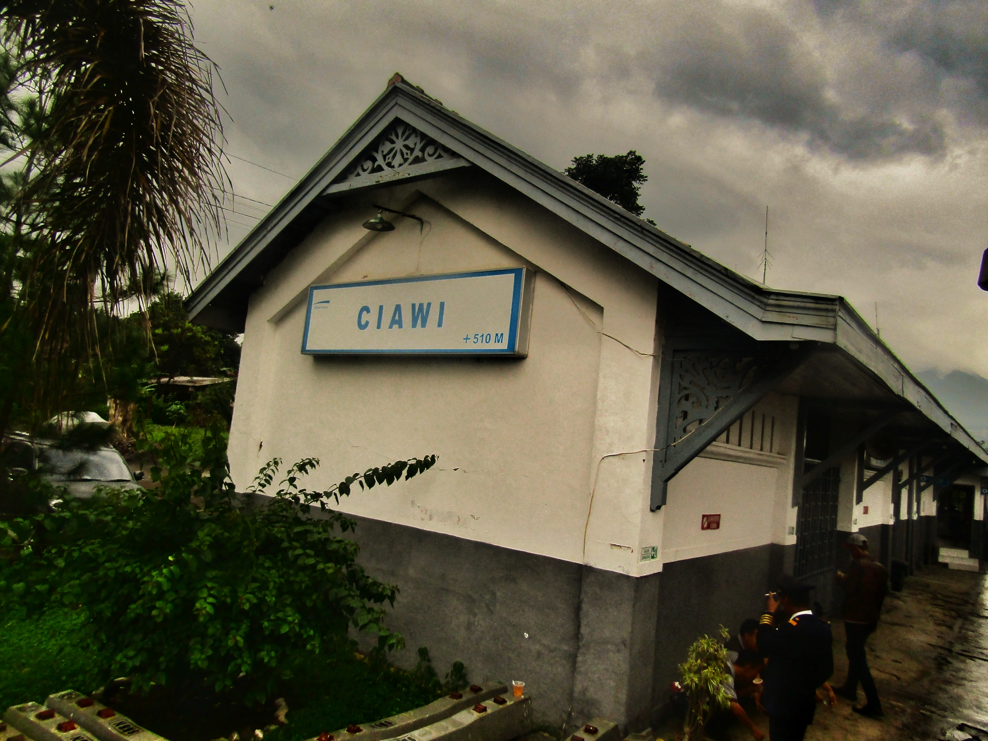 Bangunan utama Stasiun Ciawi, 2020